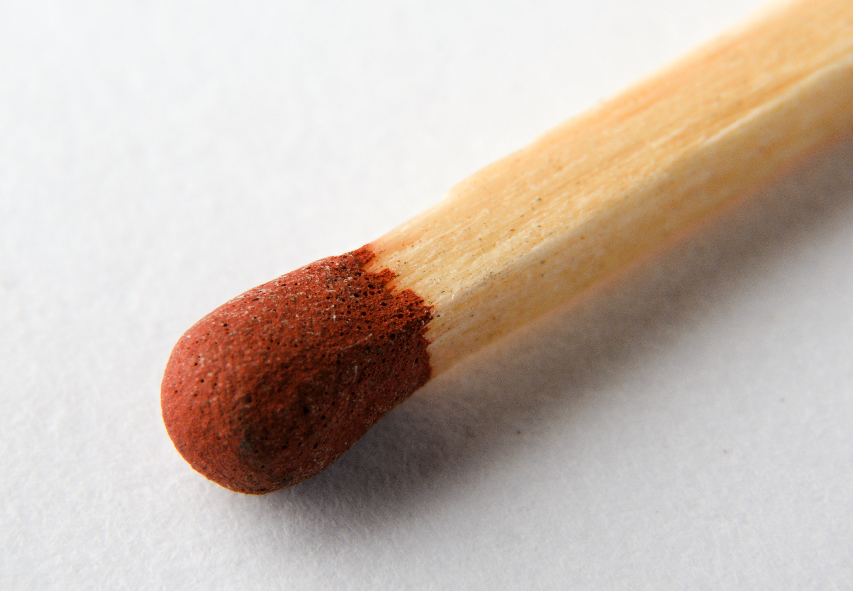 Match macro photom